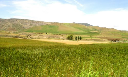 اراضي فلاحية بامتياز